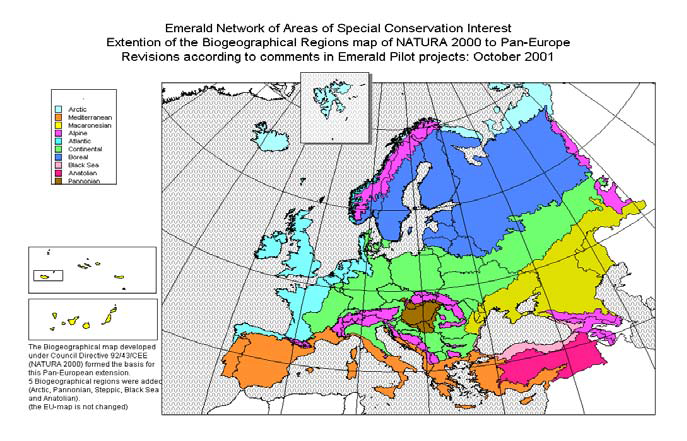 Схема біогеографічного поділу Європи станом на 2001 рік